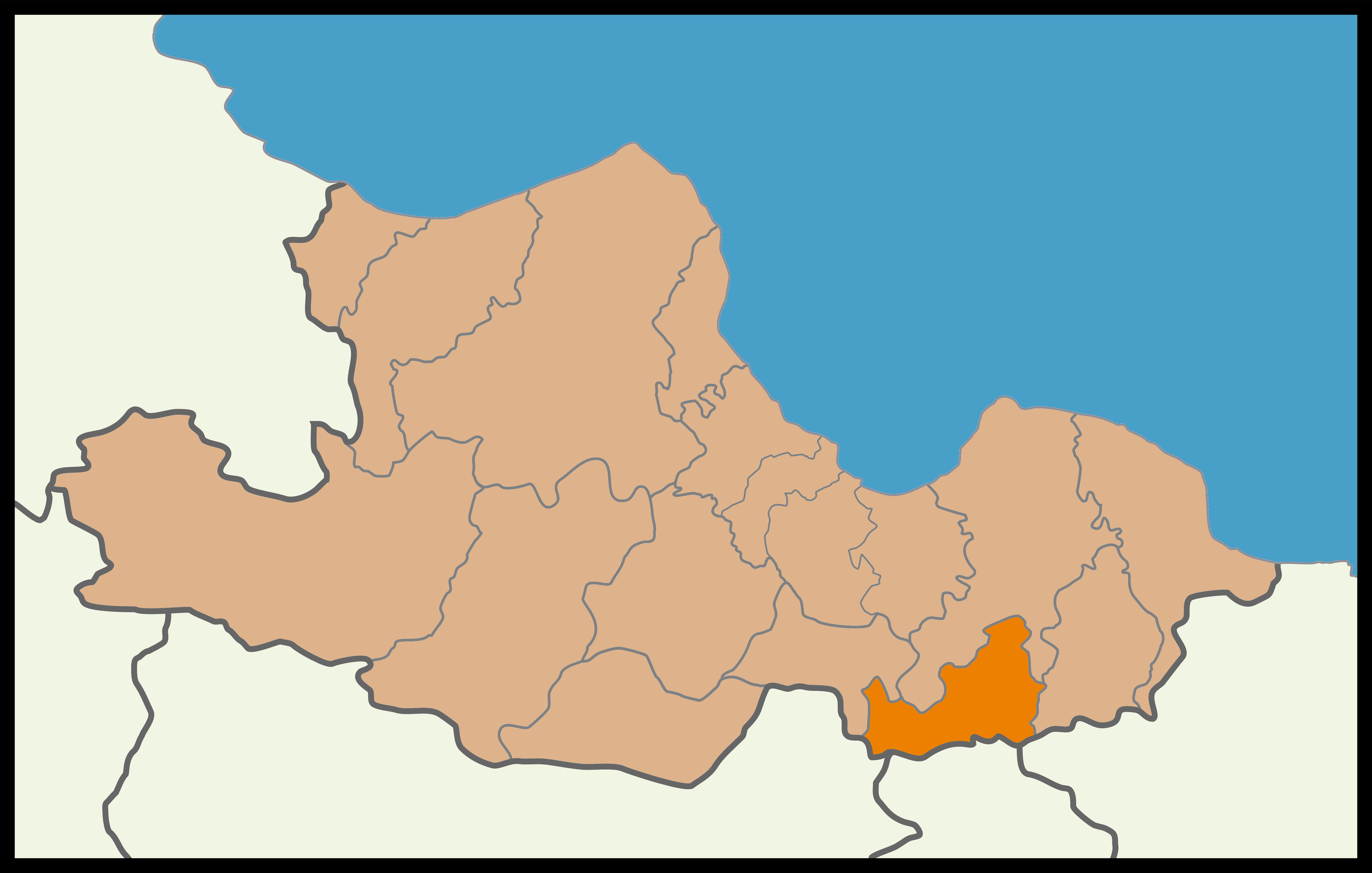 Samsun'un Ayvacık ilçesinin 2015 Türkiye genel seçimleri haritası.